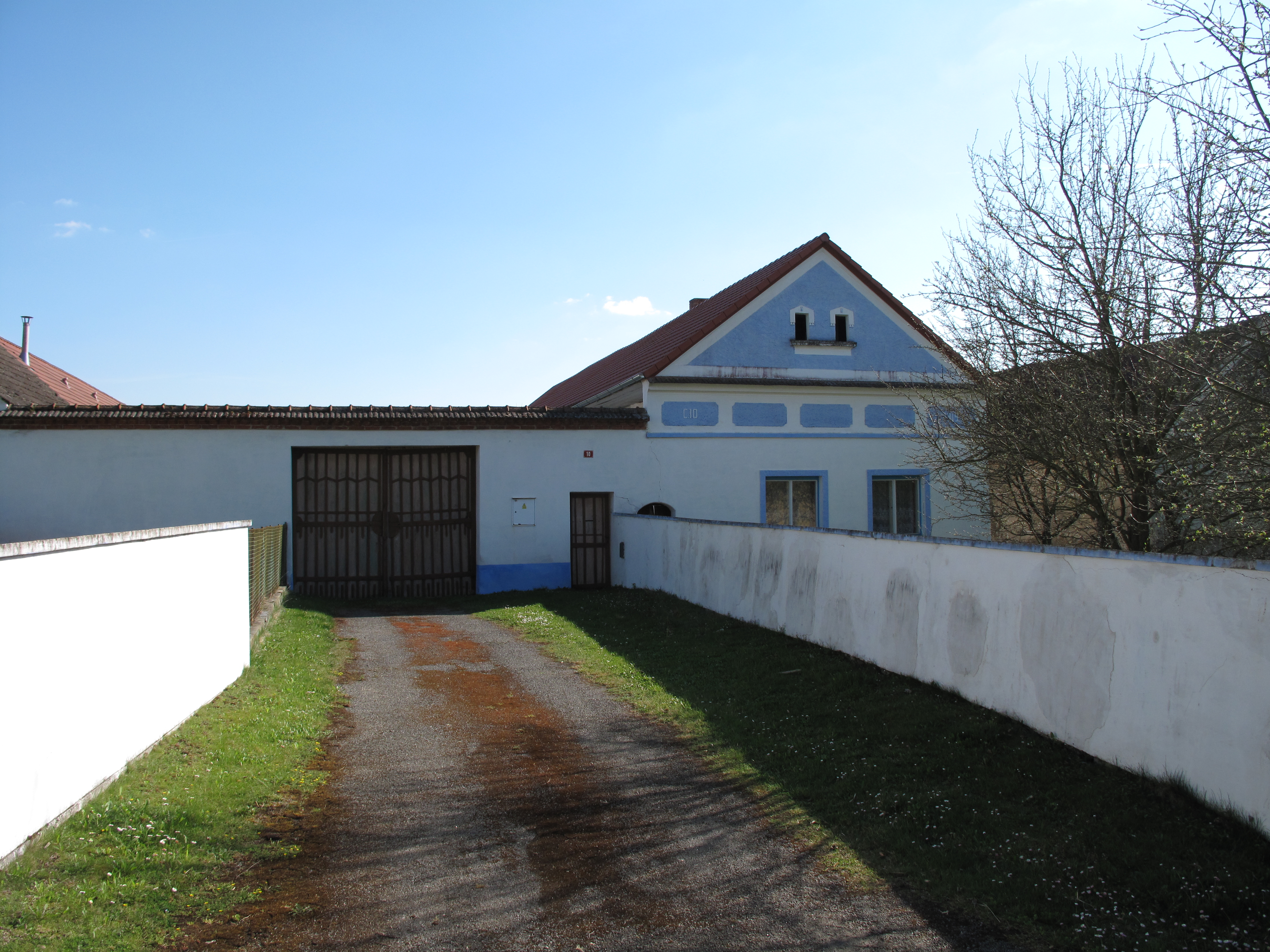 Statek v Třitimi. Okres České Budějovice, Česká republika.